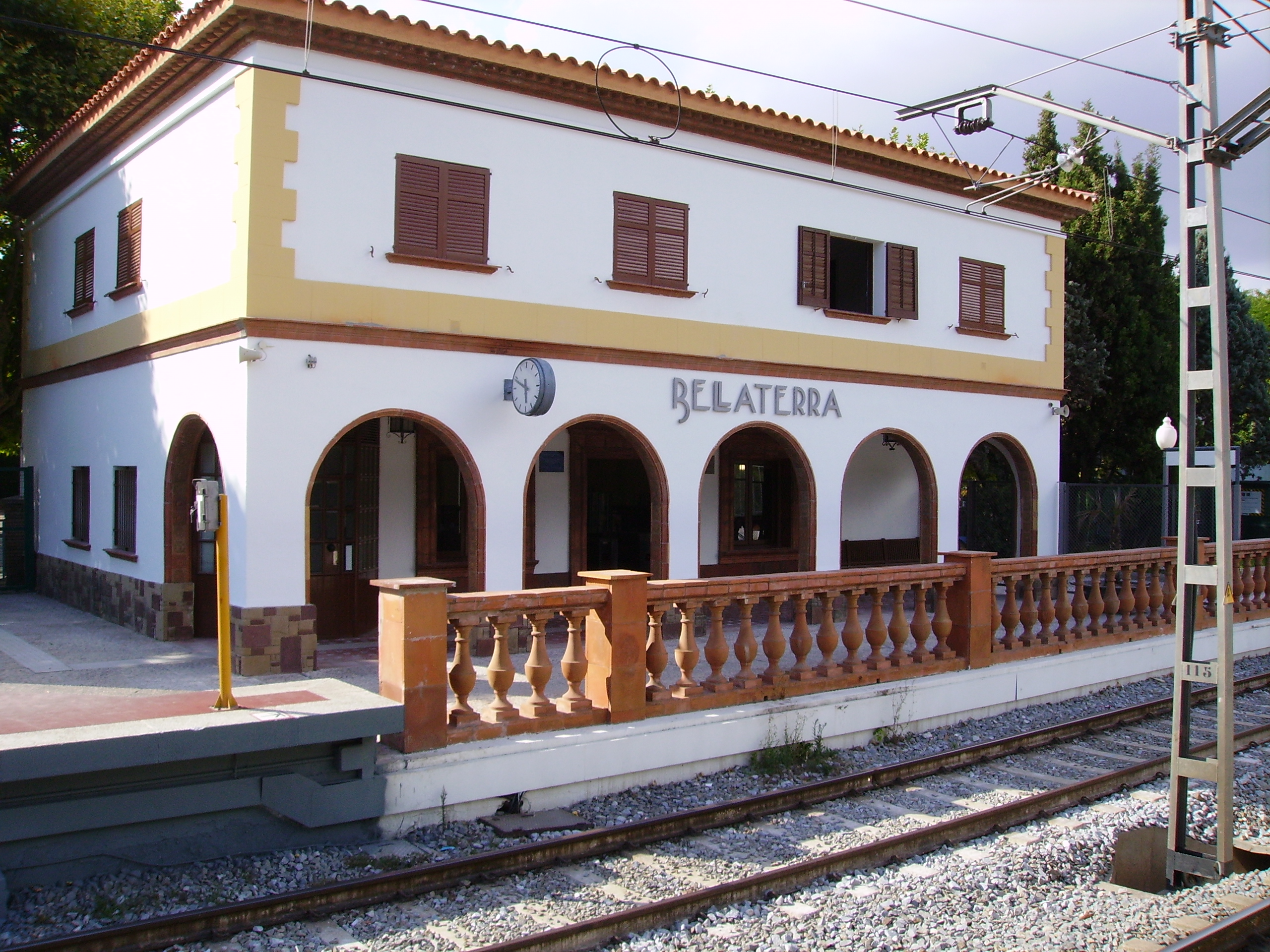 Estació de Bellaterra (FGC), Cerdanyola del Vallès, Catalunya.